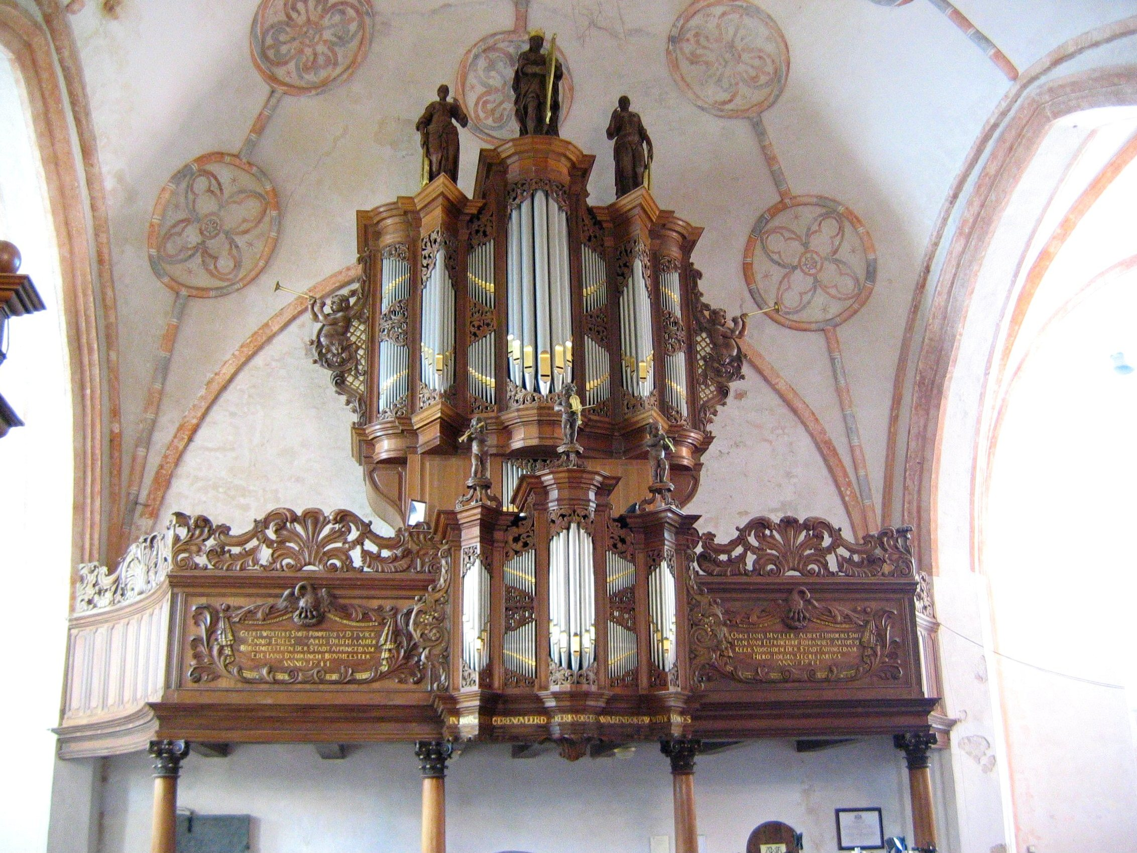 Orgel in Appingedam, Niederlande